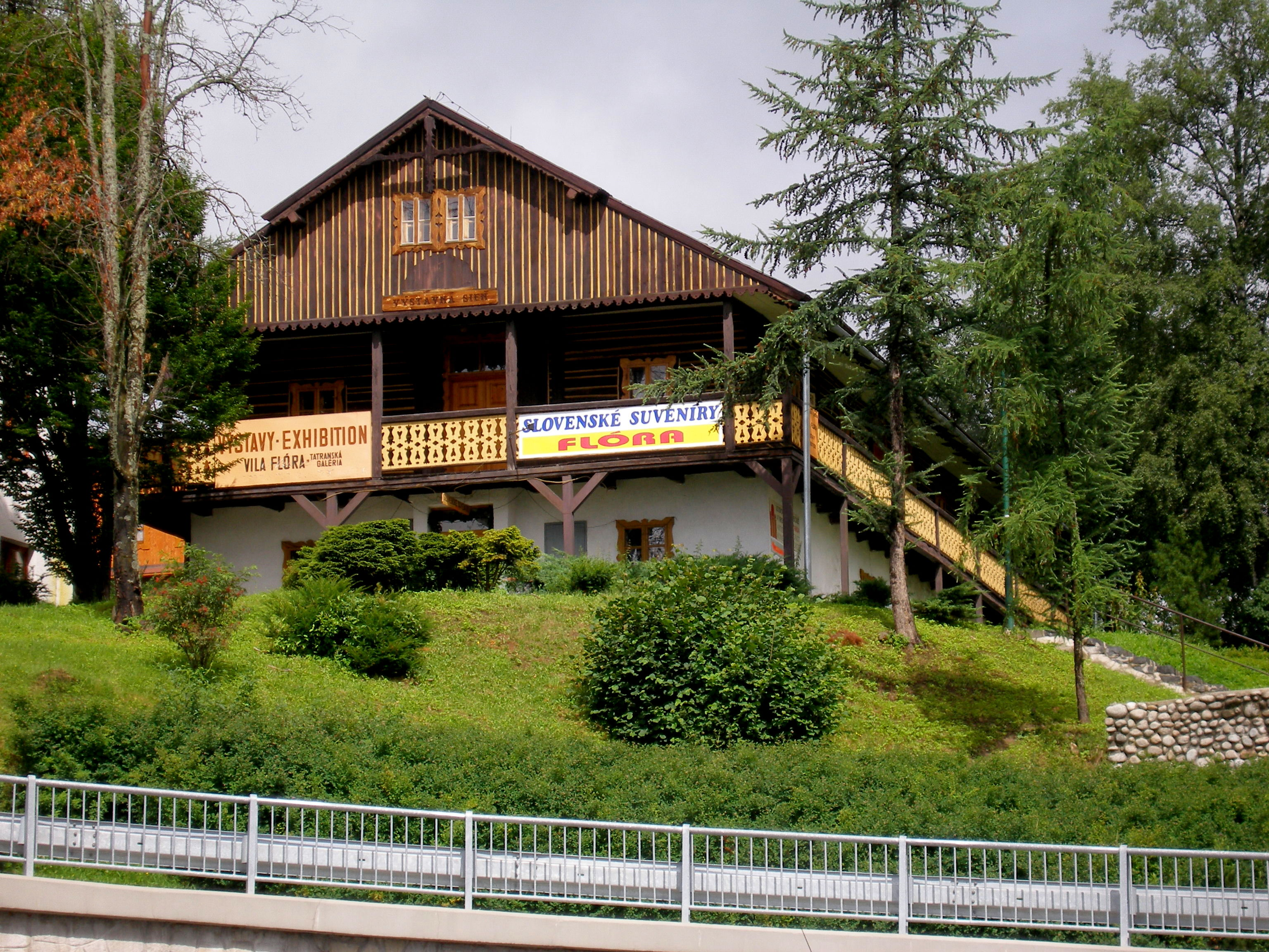 Vila Flora z roku 1839 bola prestavaná v roku 1861. Tatranská osada Starý Smokovec, mesto Vysoké Tatry, okres Poprad.